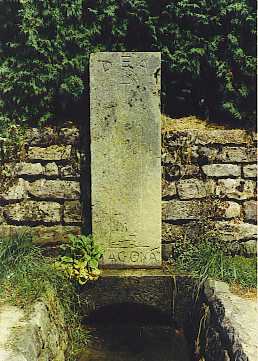 propre photo